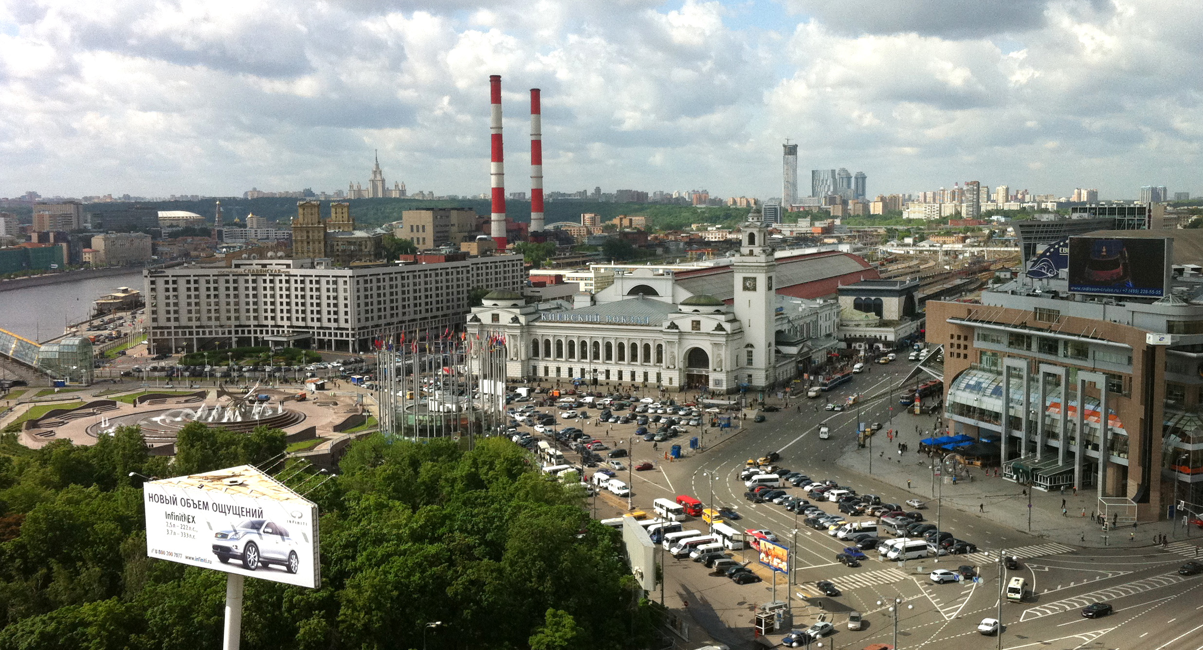 Фотография площади Киевского вокзала с крыши дома